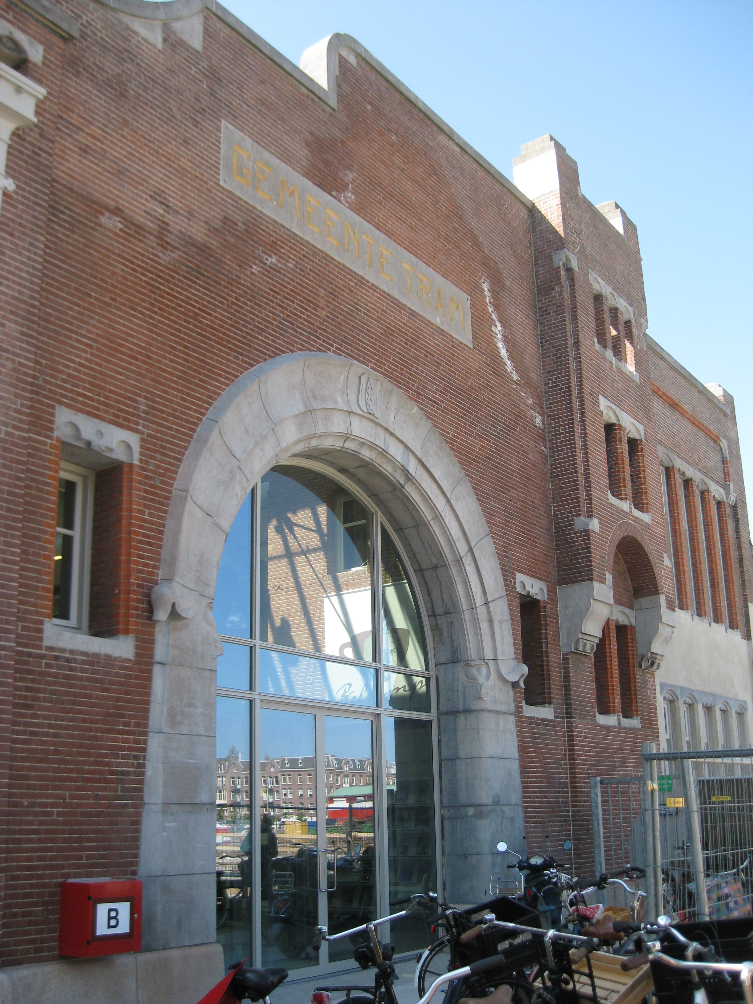 De Hallen cultureel centrum in de Kinkerbuurt in Amsterdam-West. Voormalige tramremise.